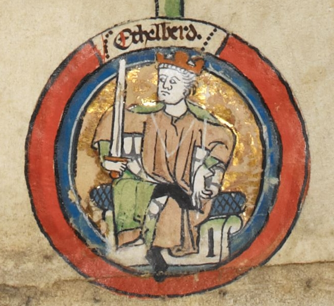 Miniature d'Æthelberht de Wessex dans une généalogie royale du XIVe siècle.